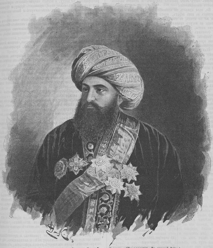 Сеид-Абдул-Ахад-Хан, бухарский эмир